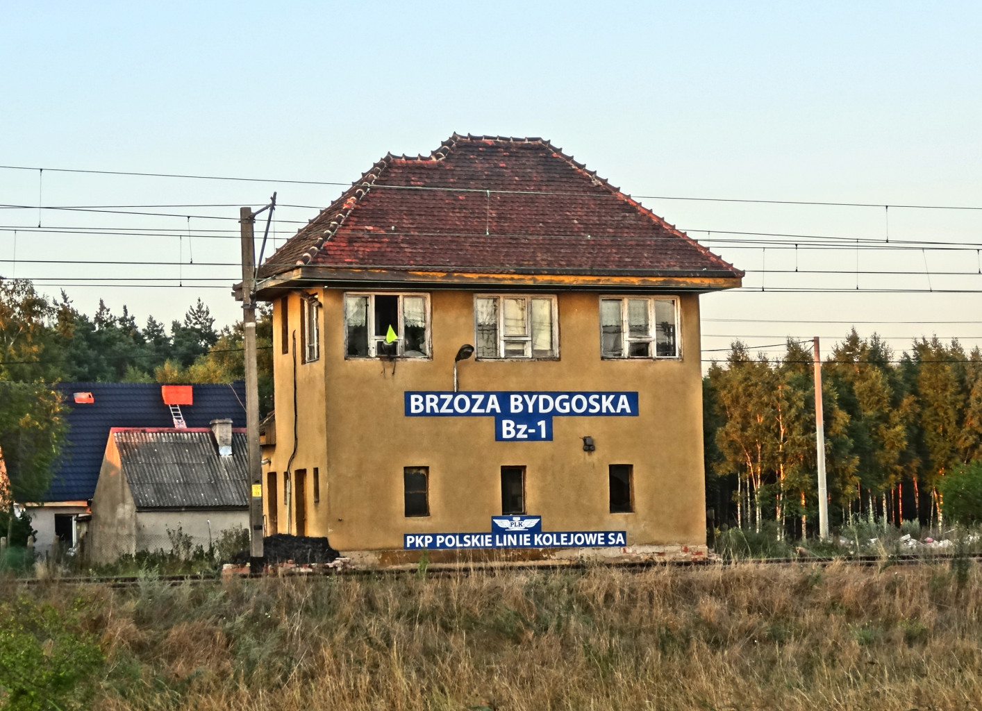 Przystanek kolejowy Brzoza Bydgoska na linii kolejowej nr 131